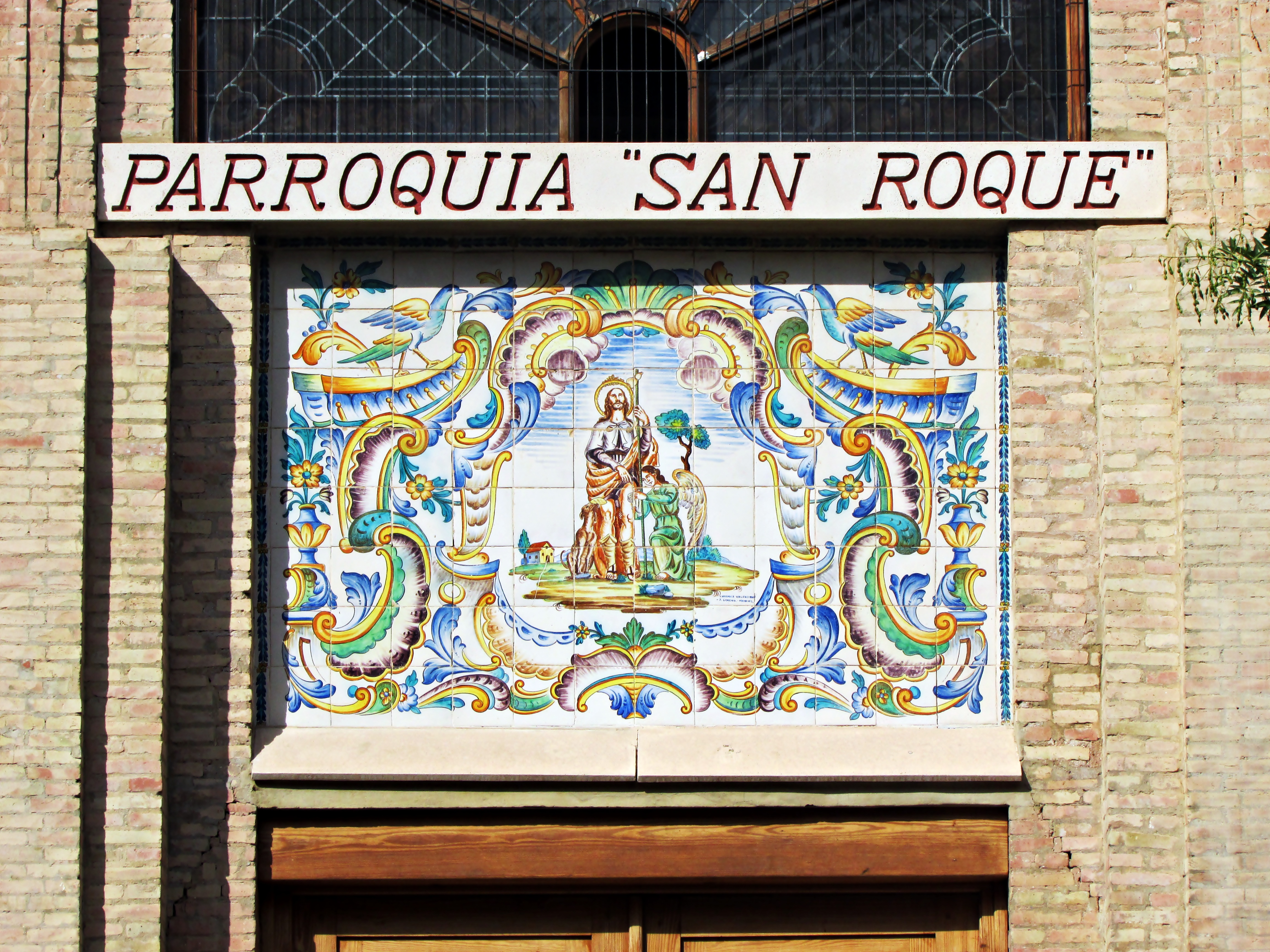 Iglesia parroquial de San Roque de Benicalap 15.250-272.